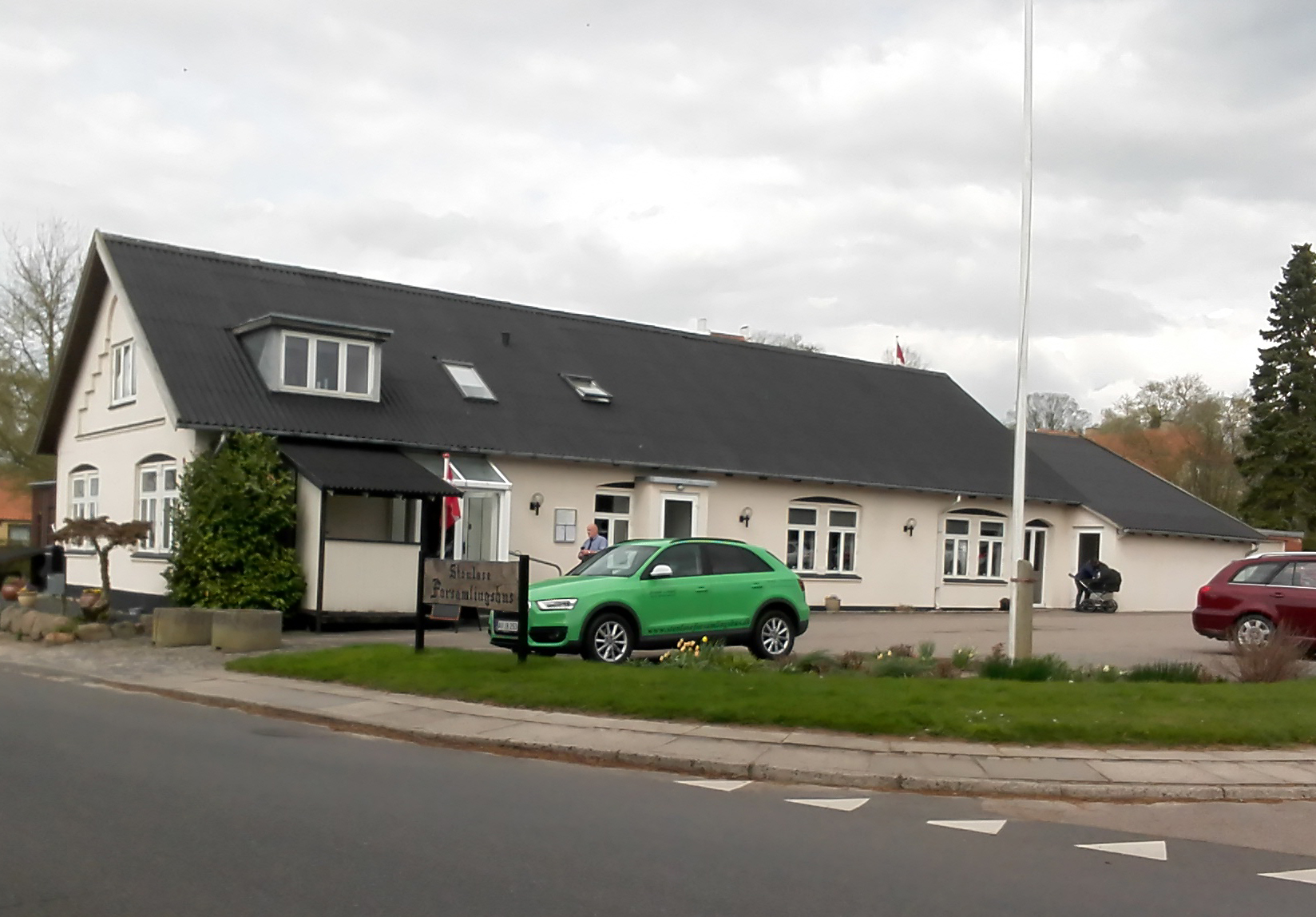 Stenløse Forsamlingshus